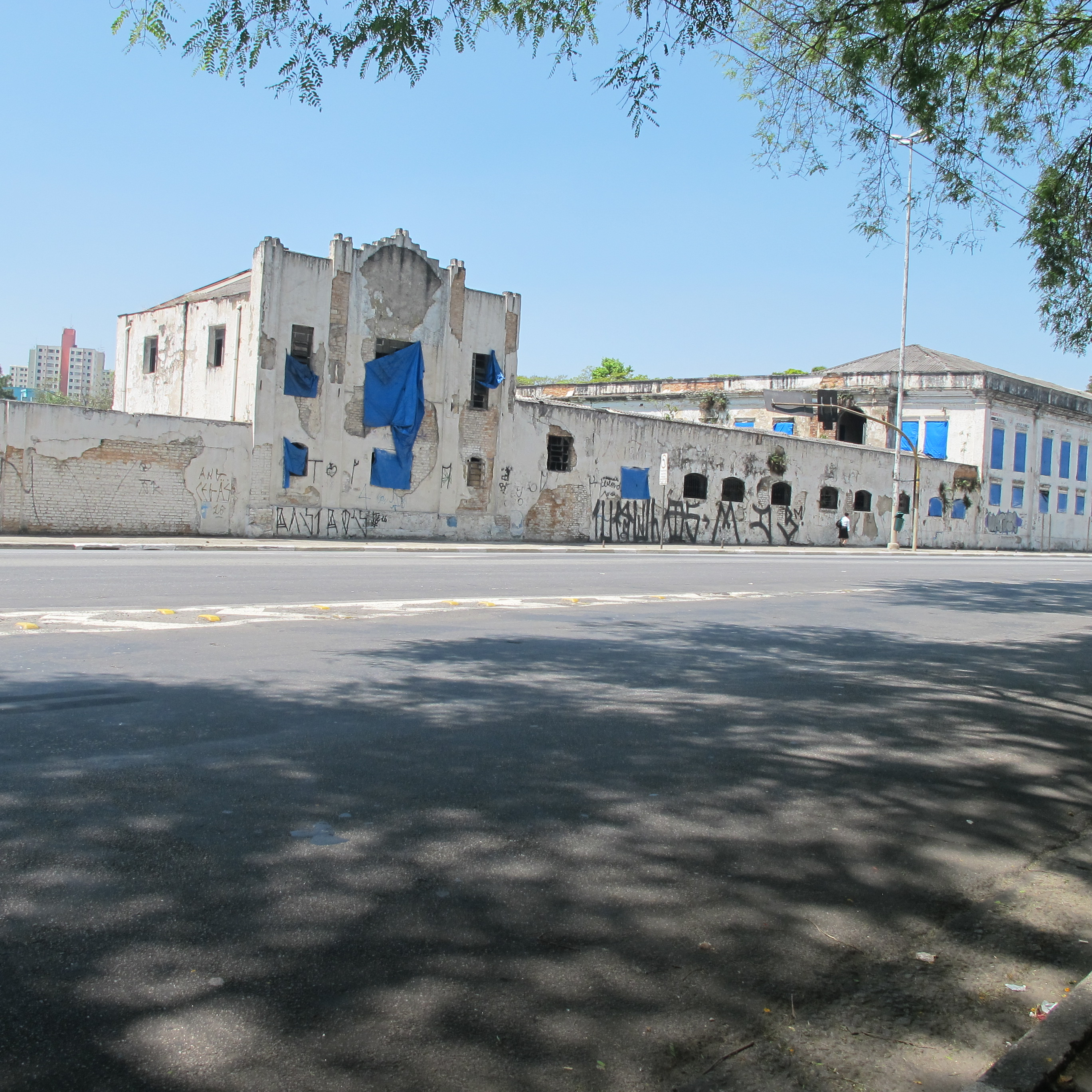 Fachada do Quartel do Segundo Batalhão de Guardas vista da calçada oposta a construção na Avenida do Estado em São Paulo, SP, Brasil.